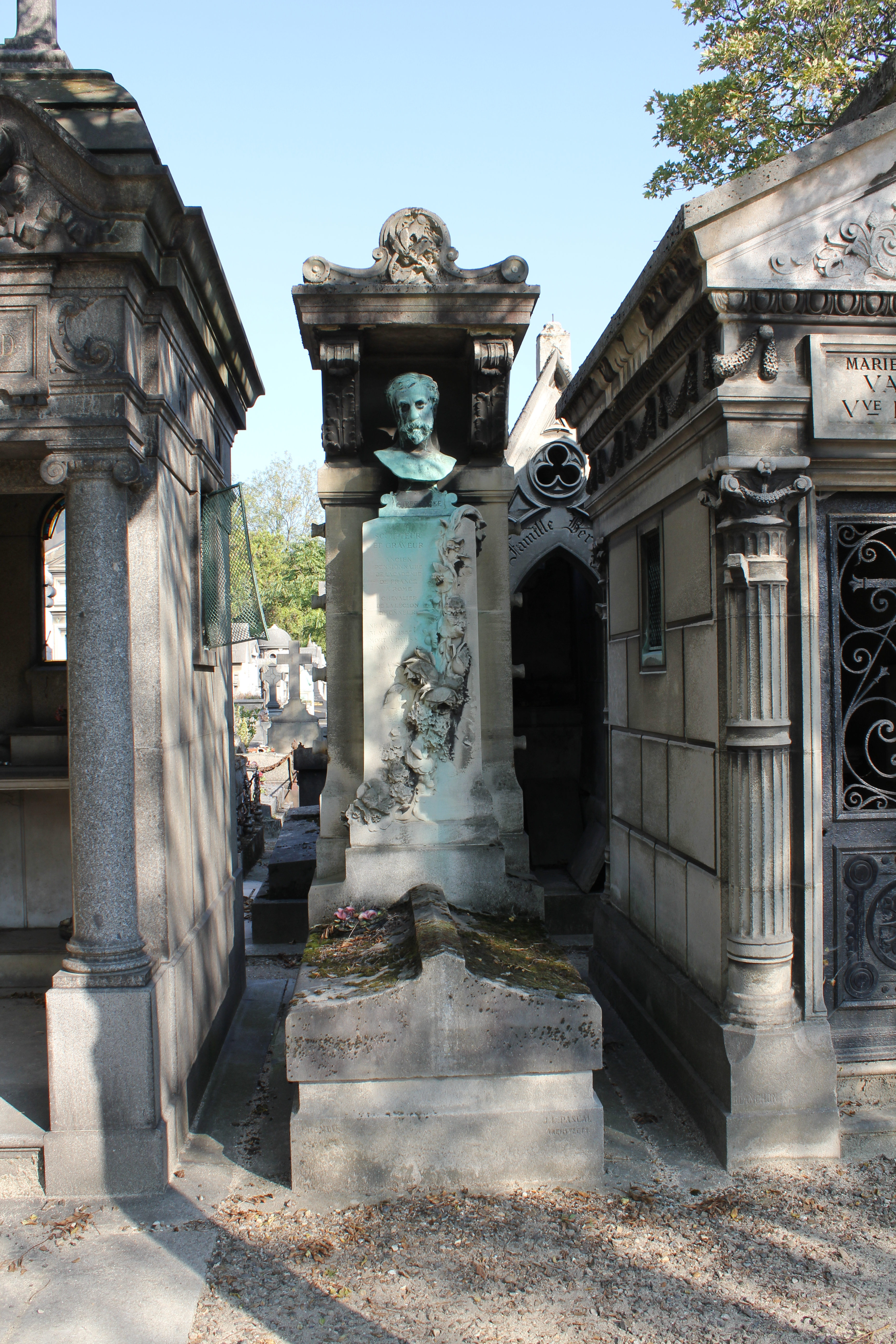 Tombe orné d'un buste en bronze signé Saint-Marceaux, à mon ami.face avant